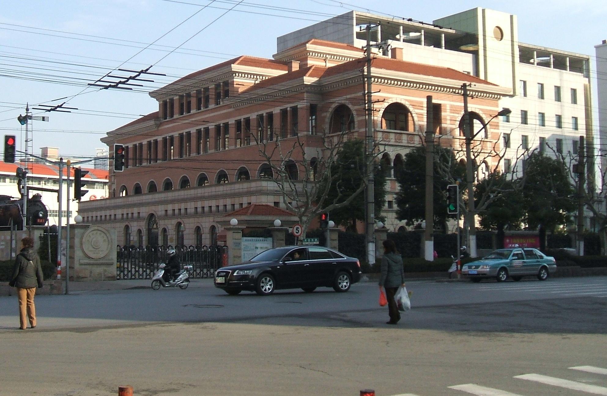 中華人民共和国上海にある上海鉄路博物館の外観、かつて上海北駅の駅舎として使用されていた